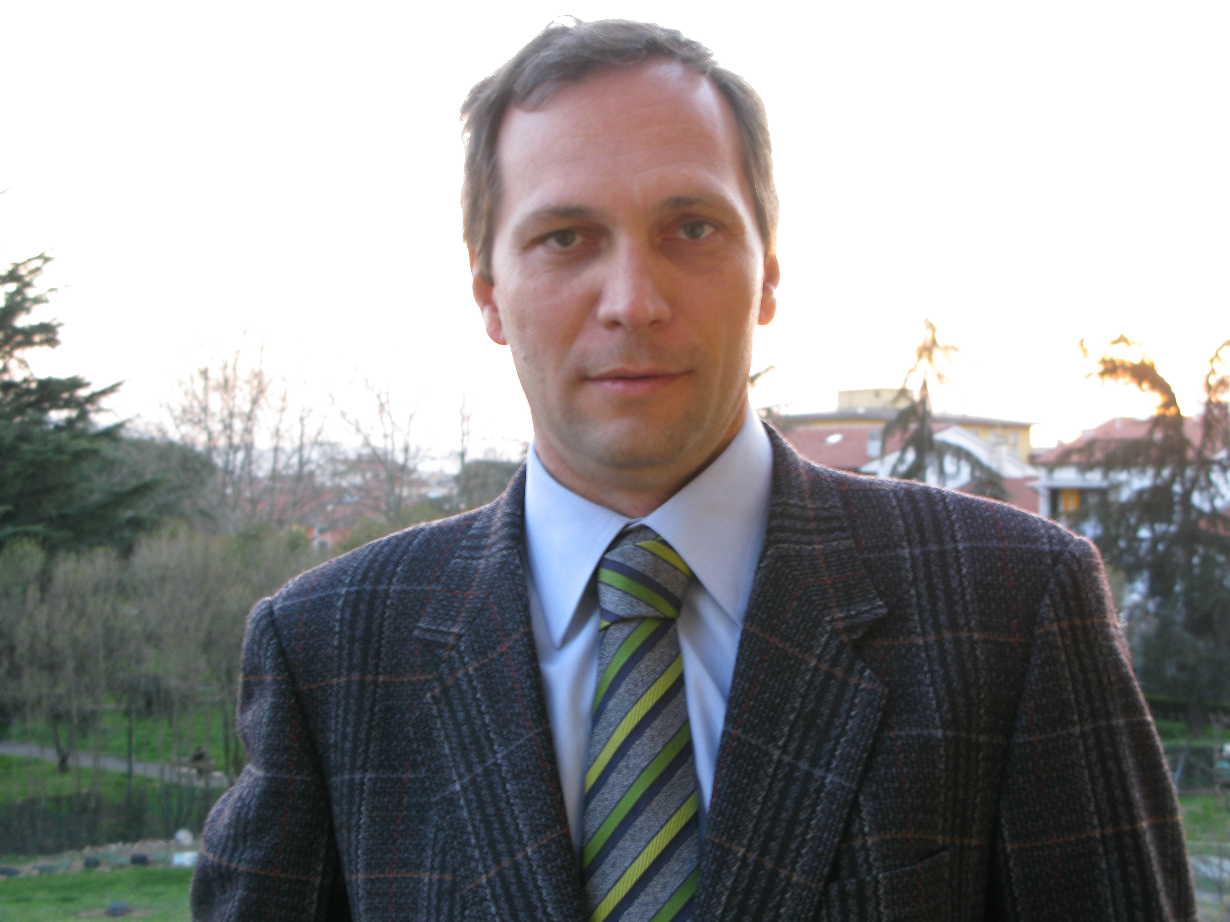 Giovanni Pratesi